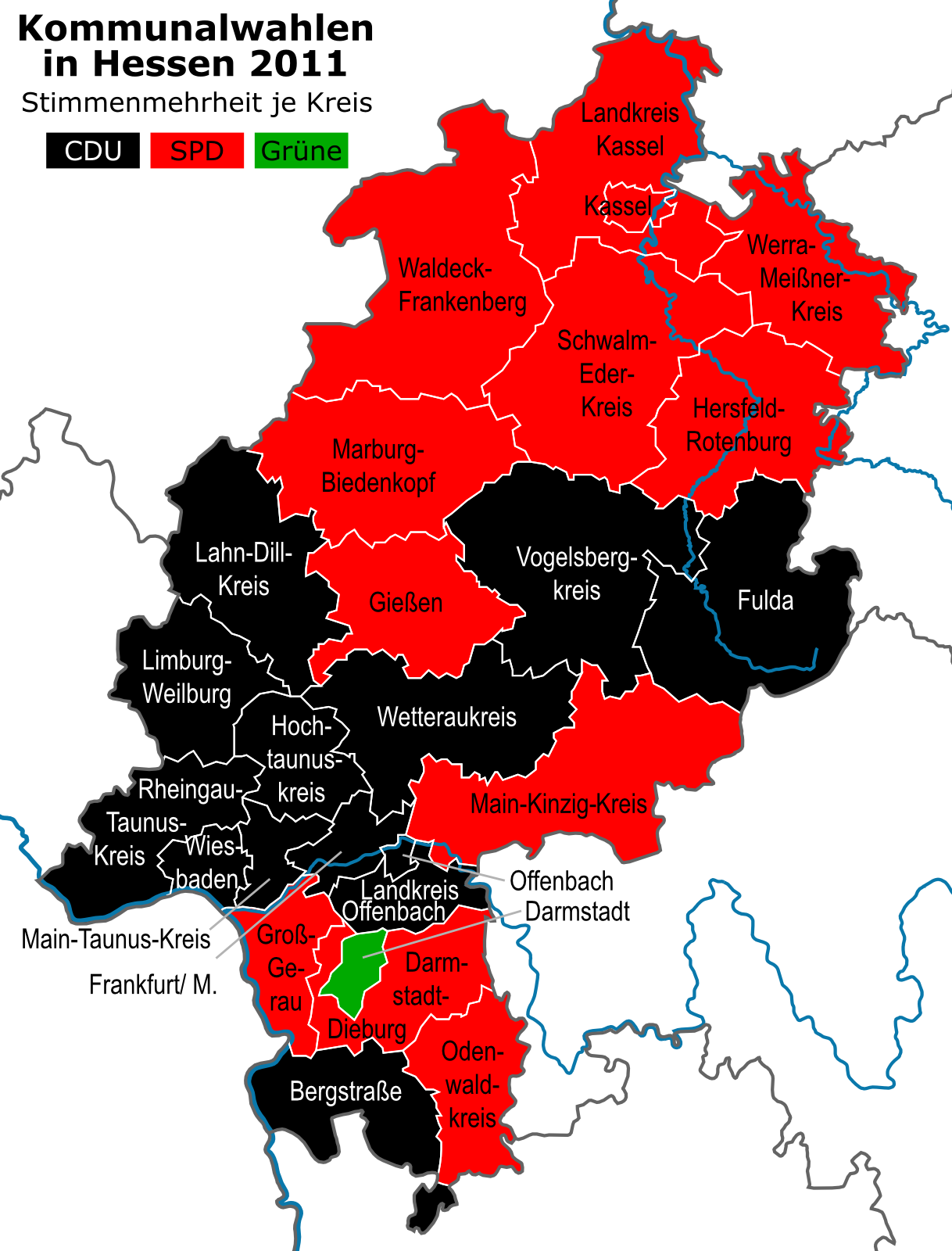 Stärkste politische Kraft der Kommunalwahlen in Hessen je Kreis